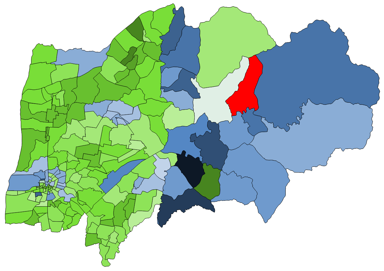 中文（台灣）: 顏色對照表 部分村里因共用投開票所 故圖中部分村里得票為依人口調整後資料 紅色部分為無人投有效票的村里